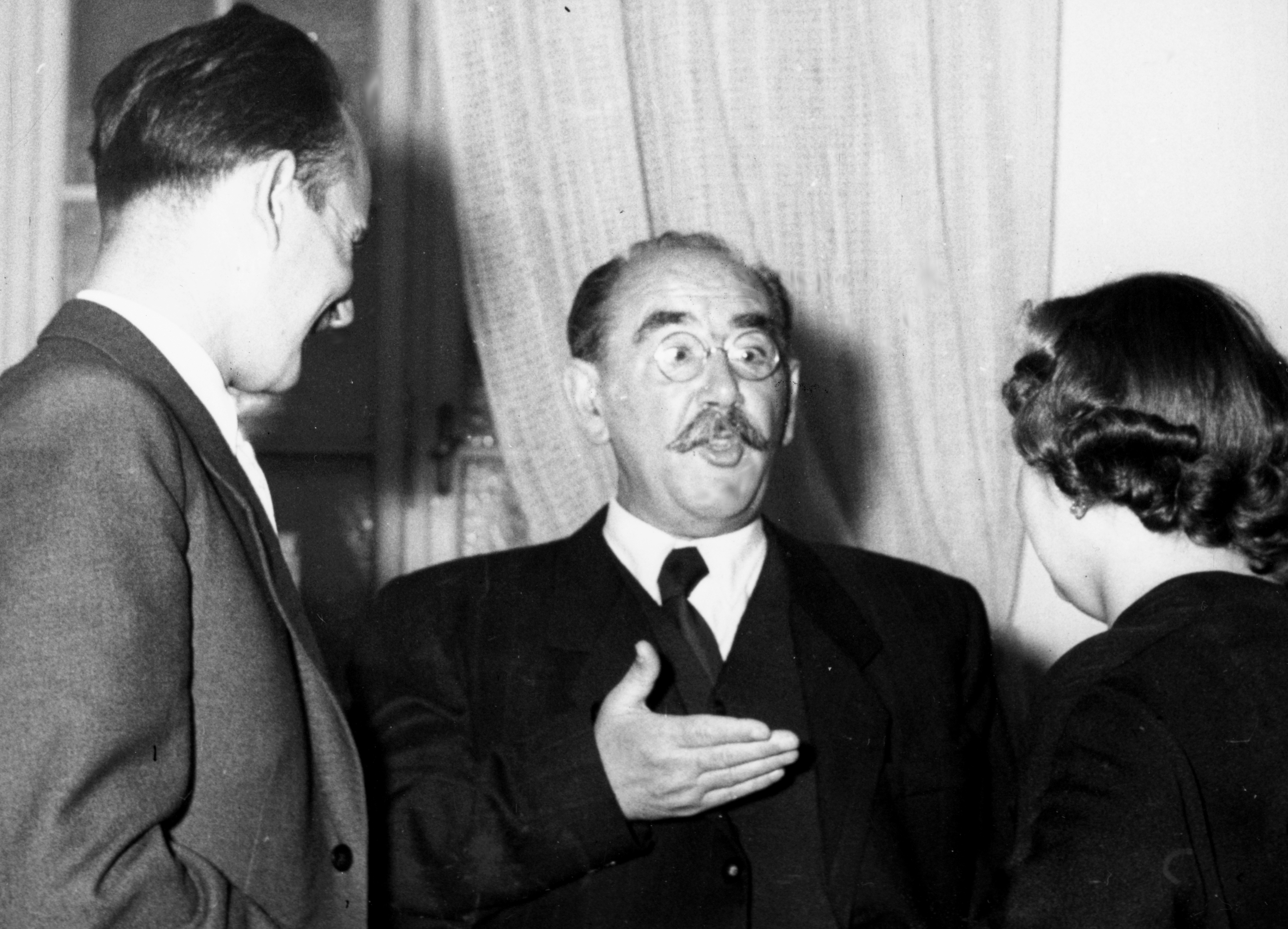 MAGYARORSZÁG, BUDAPEST VIII., 1956. október 13., középen Nagy Imre miniszterelnök, az egykori Győrffy kollégisták találkozóján a Kossuth klubban.